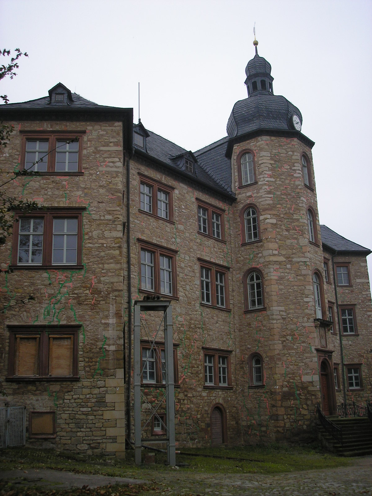 Das Schloss von Wiehe (Thüringen).